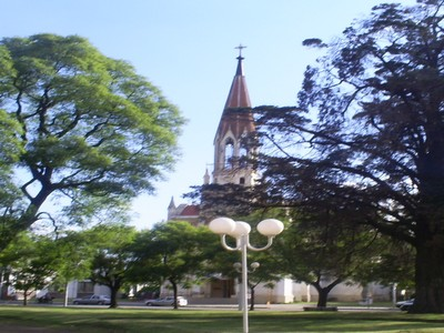 Iglesialinqueña